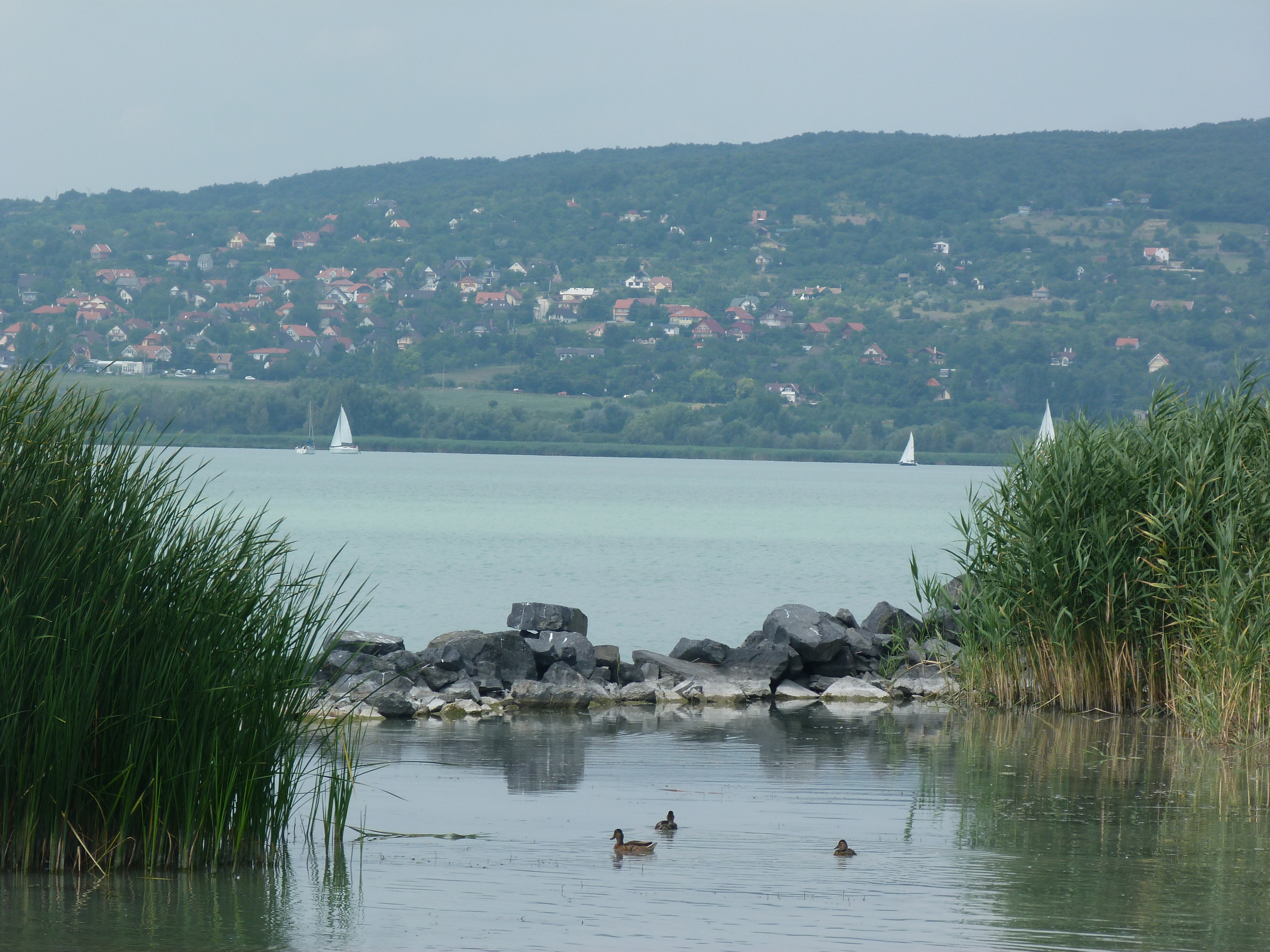 A felvétel 2015. augusztus 3-án készült Balatonfűzfőn. Fűzfői öböl, a község déli végéről fényképezve. ©© Derzsi Elekes Andor, Budapest, 2015, A fénykép másolását és felhasználását a szerző ellenérték nélkül megengedi. Az engedély kiterjed a kereskedelmi célú hasznosításra is. Kéri azonban nevének feltüntetését a felhasználás során. A Metapolisz sorozat valamennyi képe és filmje Creative Commons alatti. kereskedelmi - for profit - célra is felhasználható. Ajánlott hivatkozás: Derzsi Elekes Andor: Metapolisz DVD line